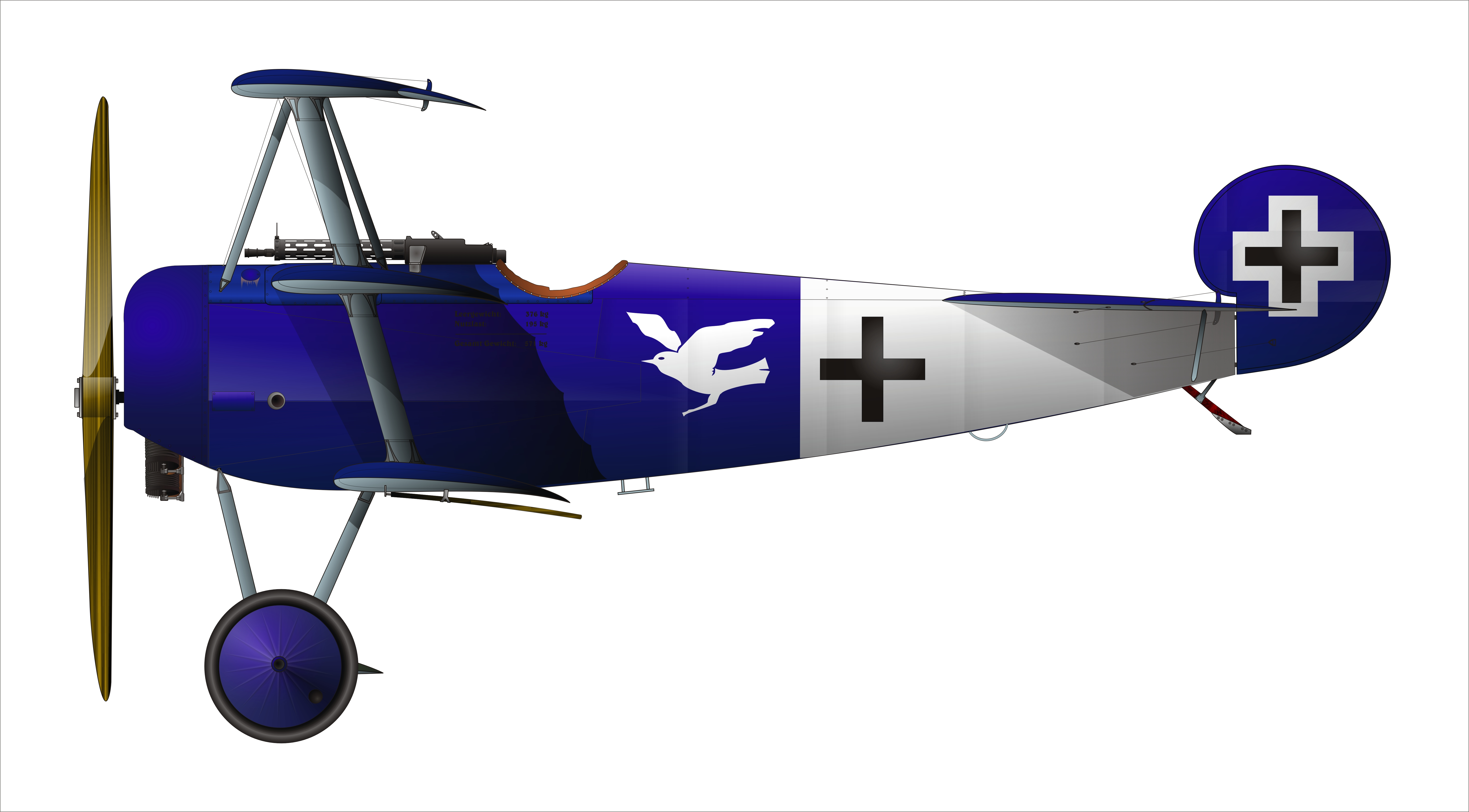 Fokker Dr.I, Western Front 1918